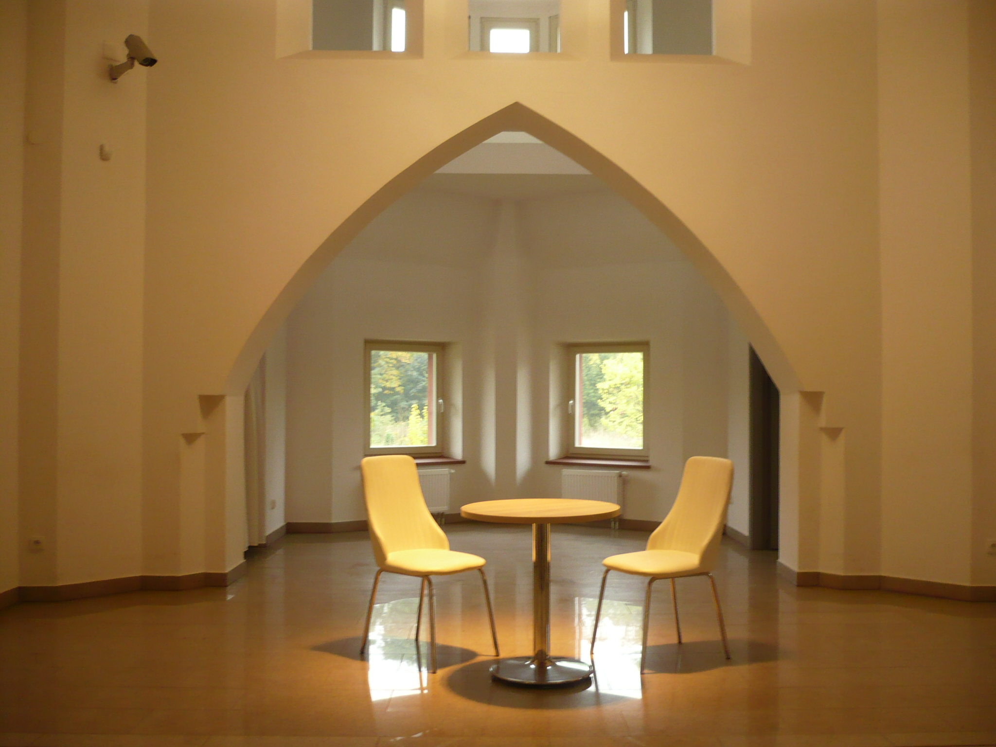 Muzeum Ziemi Sowiogórskiej w Ludwikowicach Kłodzkich